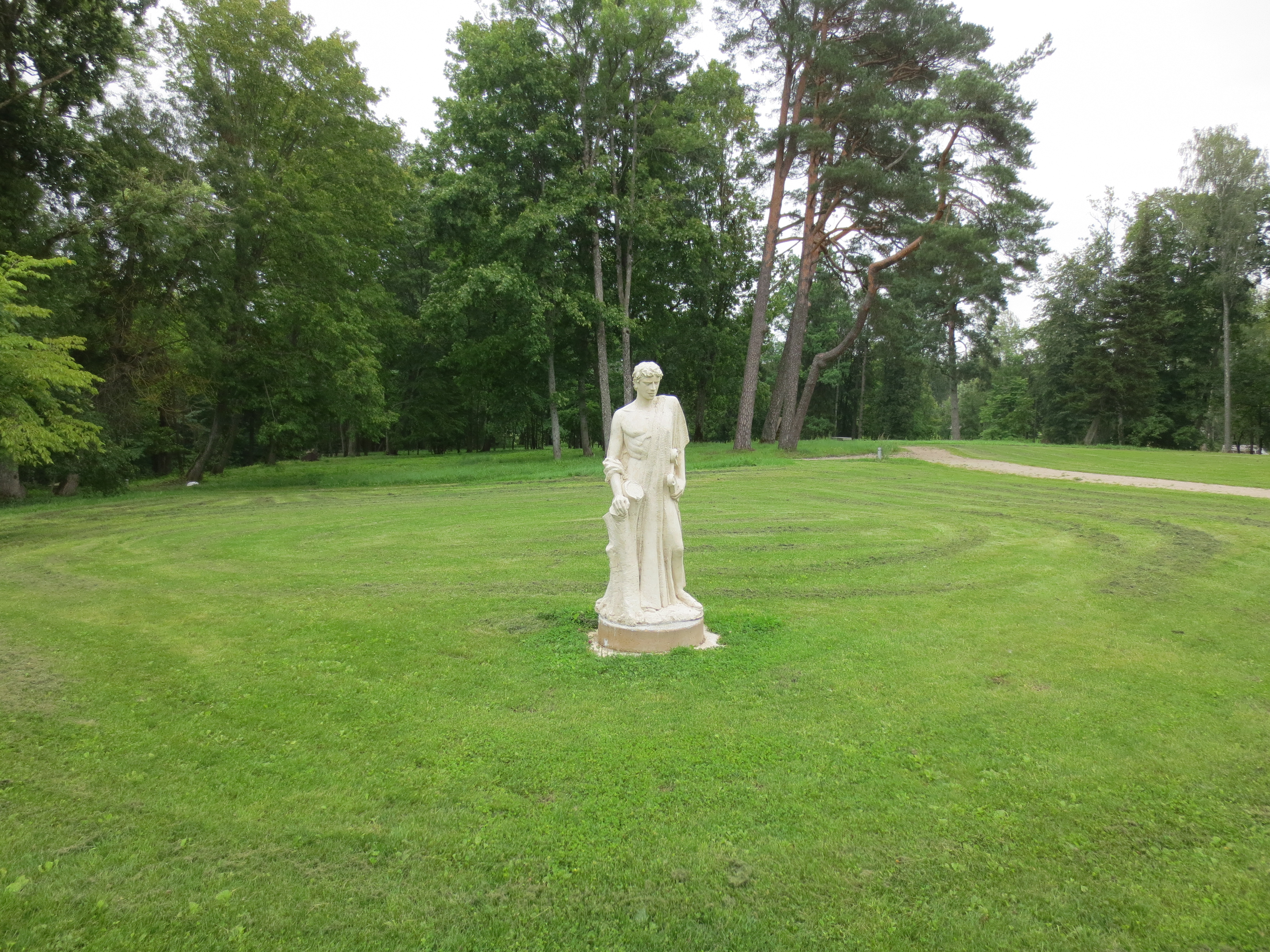 Burbiškis, Lithuania